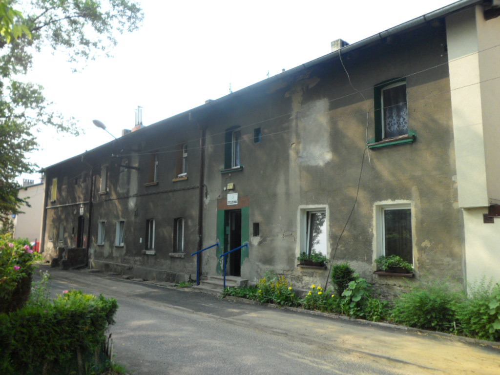 Budynek przy ul. Studzienna 6 w Katowicach-Dębie. Dom rodzinny Ryszarda Hermana / Richard Herrmann (Źródło info: Jego ojciec Wilhelm Herman był górnikiem (Opowieść o Ryszardzie Hermanie - śląskim mistrzu świata. Paweł Czado. 9 czerwca 2006), który mieszkał wraz z rodziną przy ul. Studzienna 6 (Księga adresowa miasta Wielkich Katowic 1935/36 r.) Schläsch: Doas Familienhaus vu Richard Herrmann ei Kattowitz. Ślůnski: Familijny dům Herrmana we Katowicach.